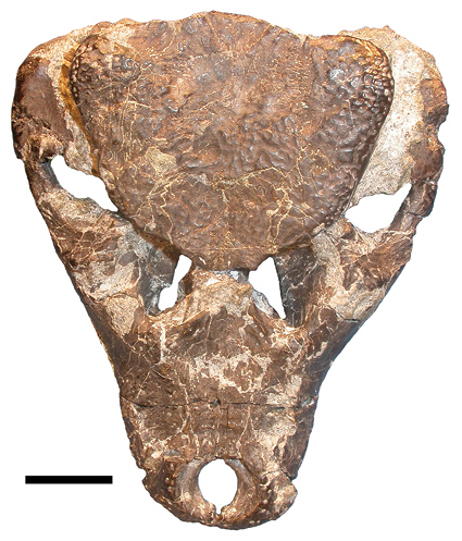 Iharkutosuchus makadii (Eusuchia, Hylaeochampsidae), skull (holotype, MTM 2006.52.1) in dorsal view